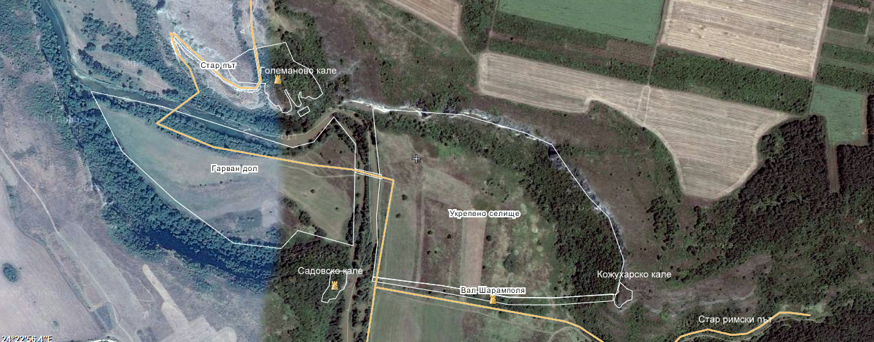 Вал Шарамполя